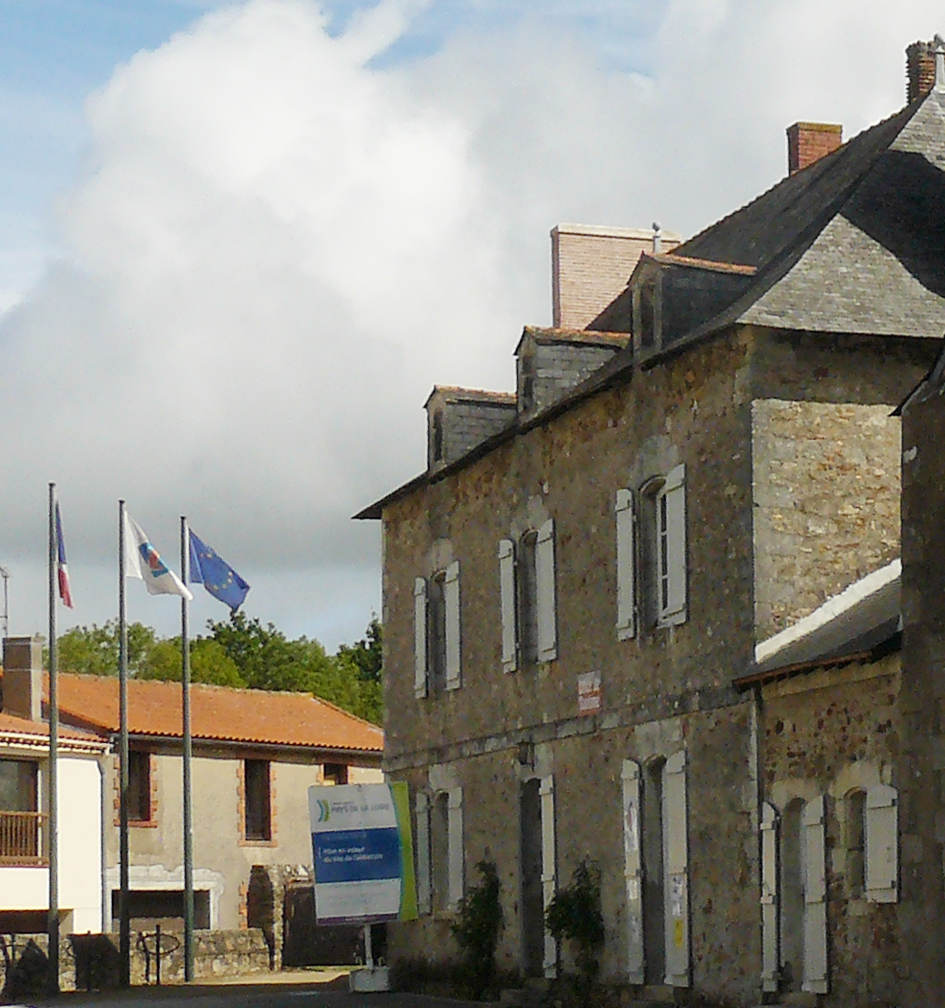 Prieuré de l'abbatiale de Saint Philbert de Grand Lieu